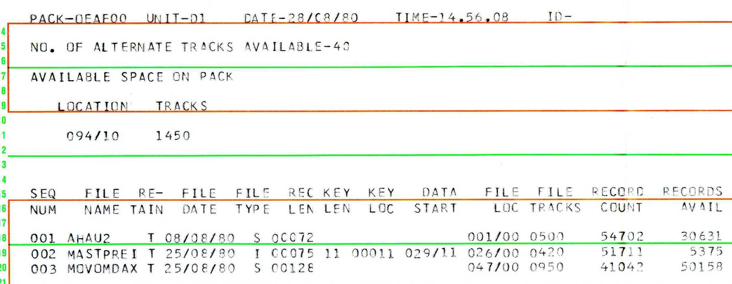 VTOC einer /38 von 1980, Original ist vom 28.08.1980